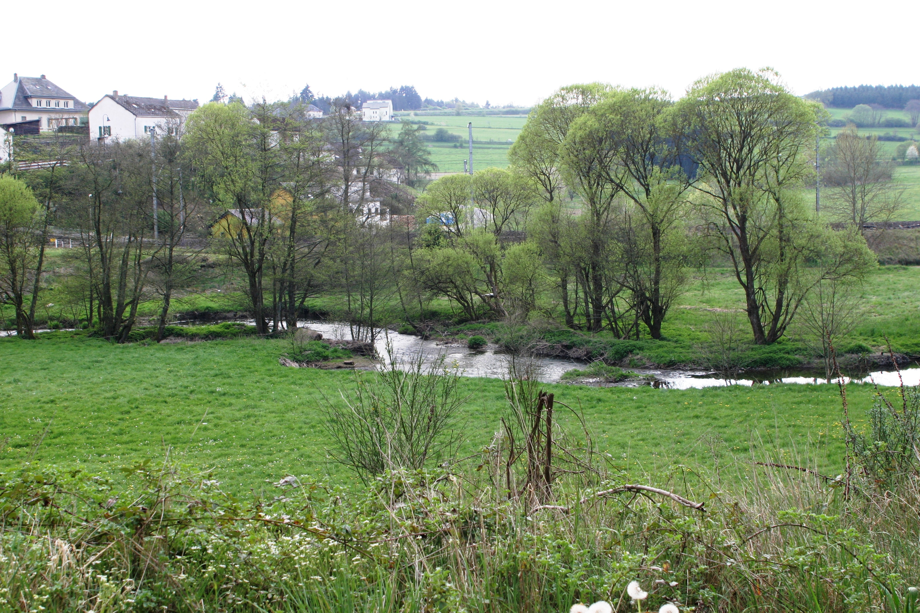 D'Klierf bei Drauffelt am Abrëll 2007 vum lénksen Uwänner gesinn. Quell: eege Photo Les Meloures